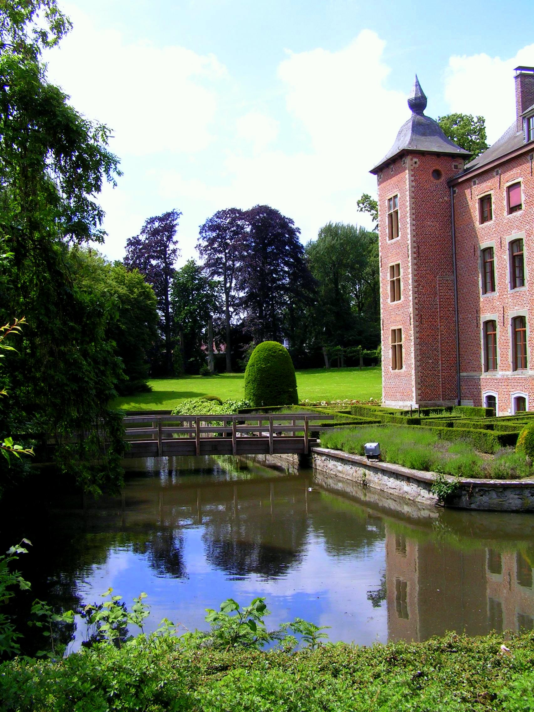 Coloma Castle, Sint-Pieters-Leeuw, Belgium